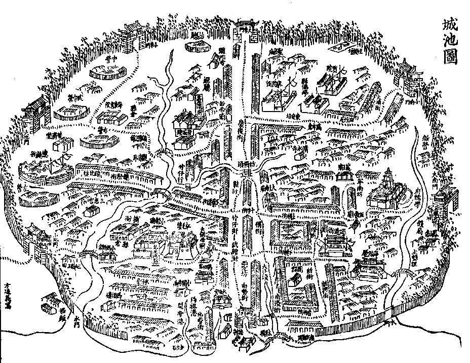 臺灣縣城池圖，從臺灣文獻叢刊擷取下來，將左右兩頁合為一幅圖，並將中間的黑線修飾消除。本圖解析度不高，先存於中文維基百科，待來日再以高解析度的圖片取代。Bân-lâm-gú: Tâi-oân-koān-siâⁿ ê tē-tô͘